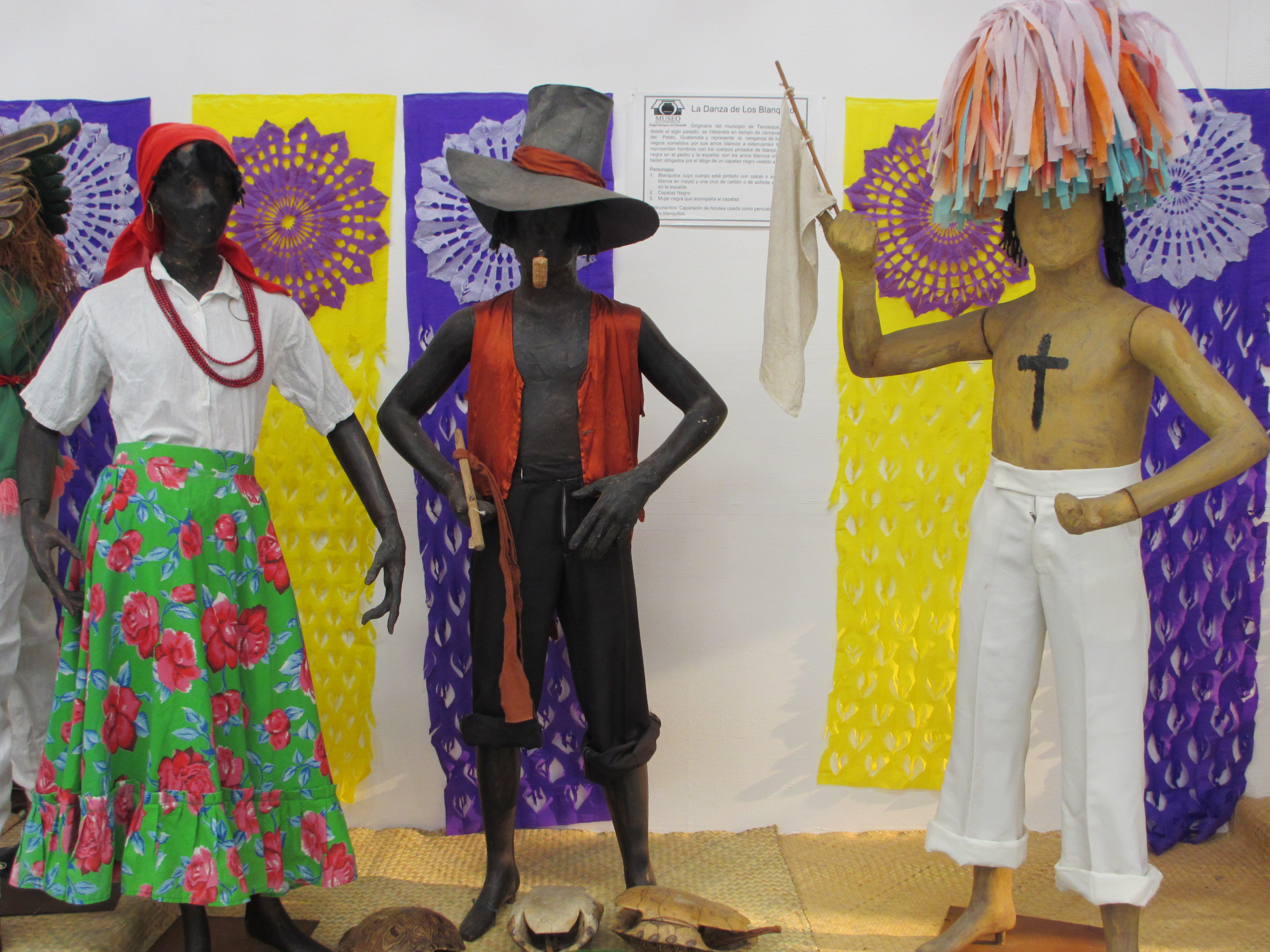 Indumentaria utilizada por los participantes en la danza de "Los Blanquitos", originaria del municipio de Tenosique. Una de las danzas más importantes y autóctonas del estado de Tabasco, México.